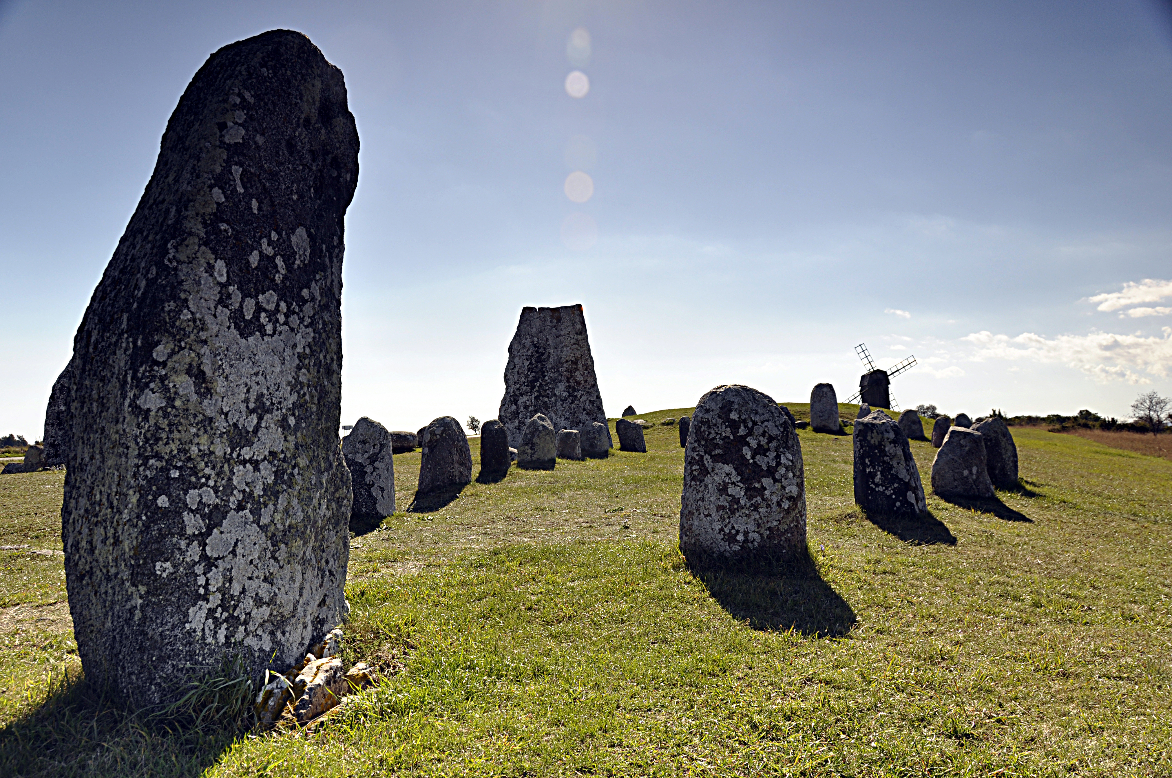 Gettlinge gravfält (Raä-nr Södra Möckleby 10:1) i Gettlinge, Södra Möckleby socken, Mörbylånga kommun, Öland, Kalmar län, Sverige. Gravfältet är 700 m långt.